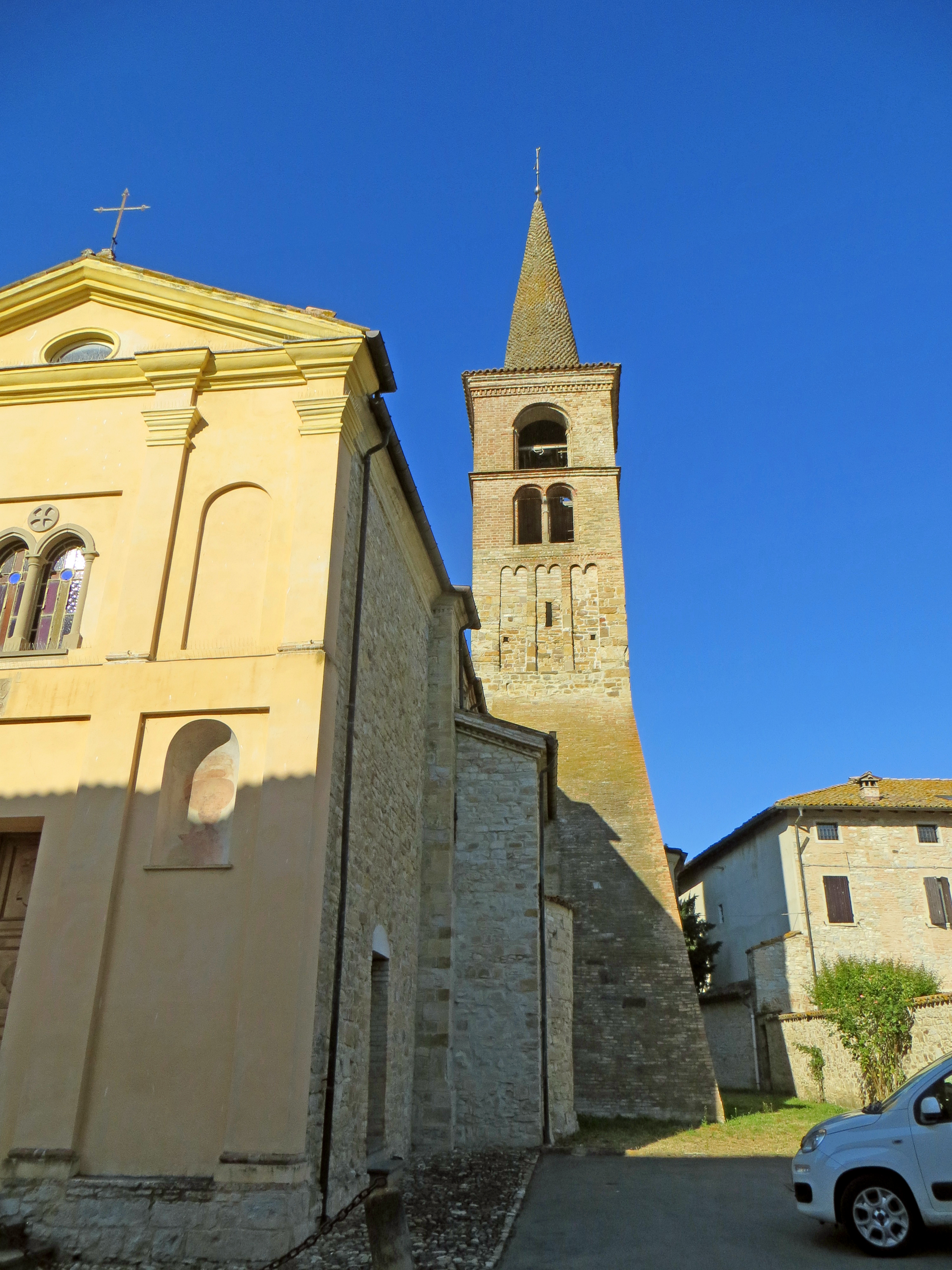 Chiesa di Sant'Ilario (Sant'Ilario Baganza, Felino) - lato sud e campanile